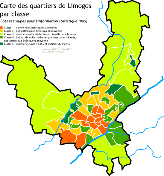 Carte des quartiers de Limoges